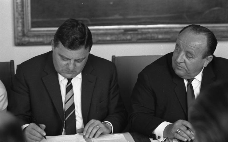 Der erweiterte Bundesvorstand der CDU-CSU bei Bundeskanzler Erhard.